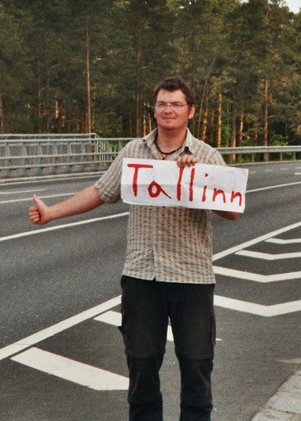 "Tramper in Estland"